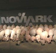 Parco archeologico Novi Ark